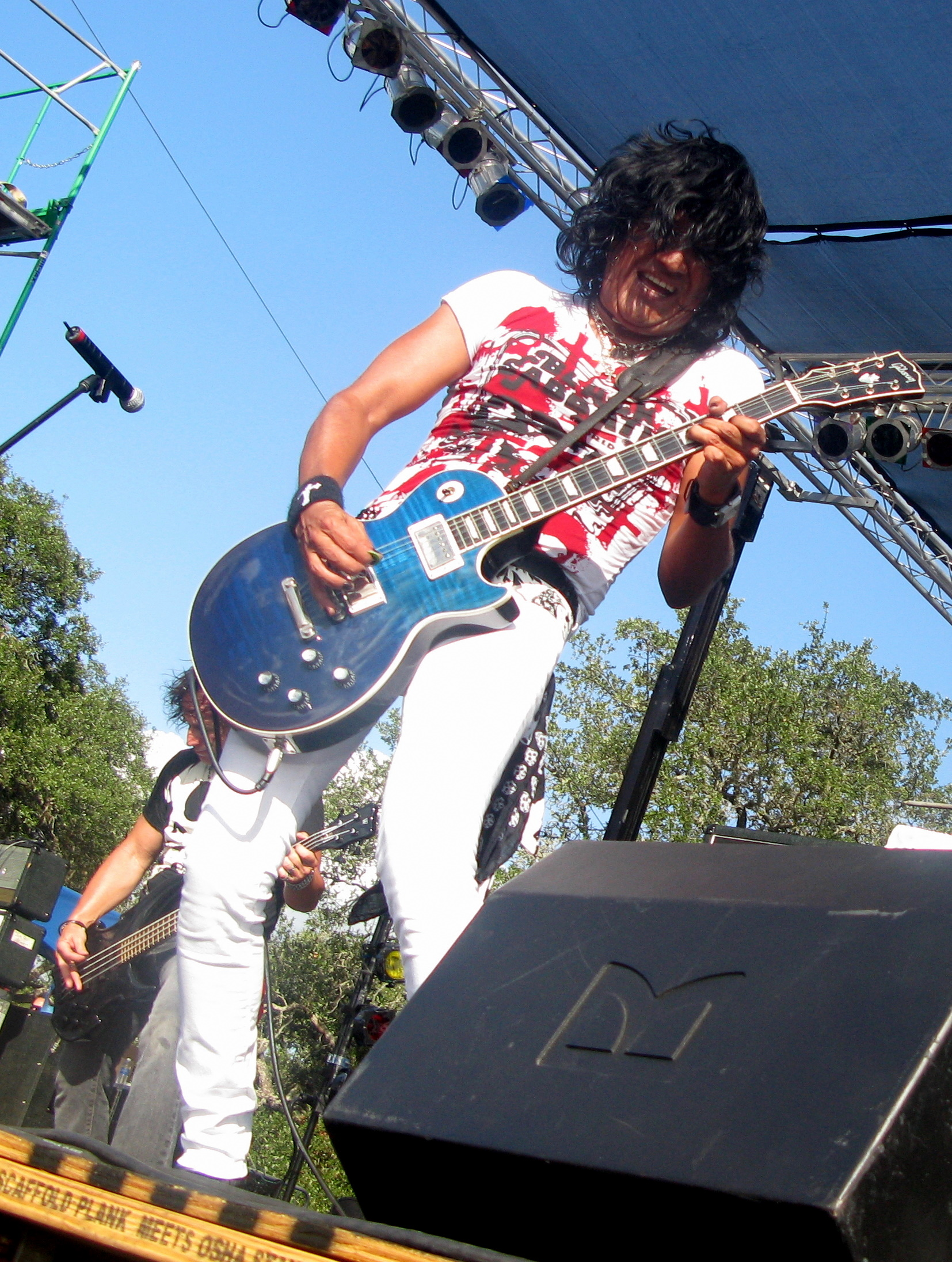 BulletBoys